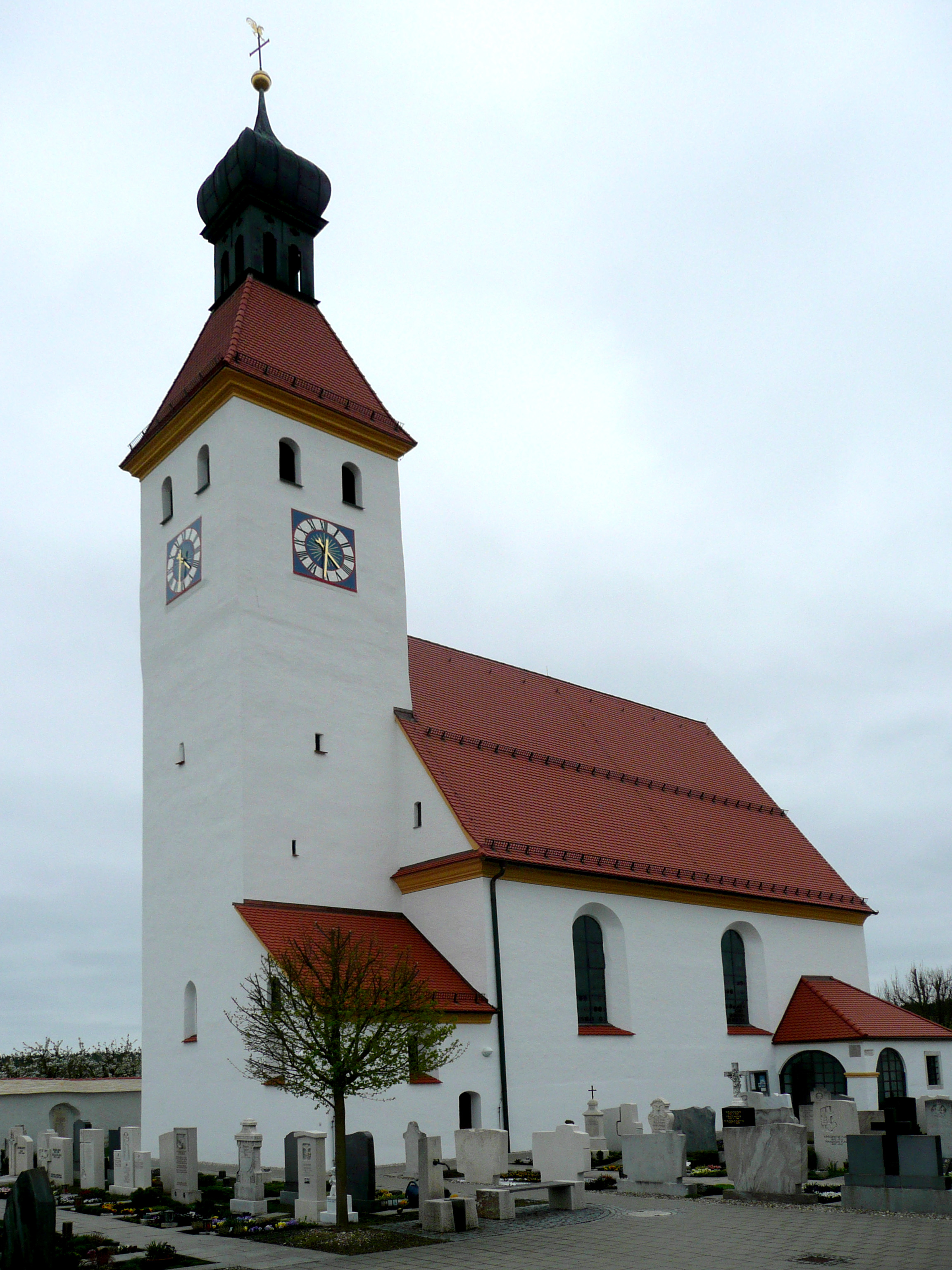 Katholische Pfarrkirche Mariä Himmelfahrt in Möckenlohe. Ansicht von NO. This is a photograph of an architectural monument.